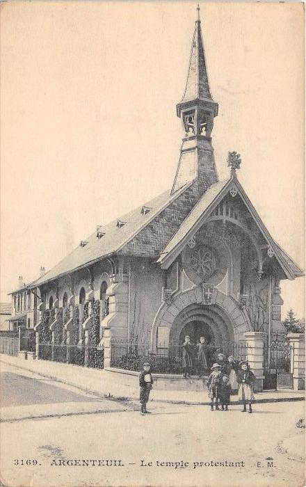 CPA le temple protestant d'Argenteuil vers 1910.